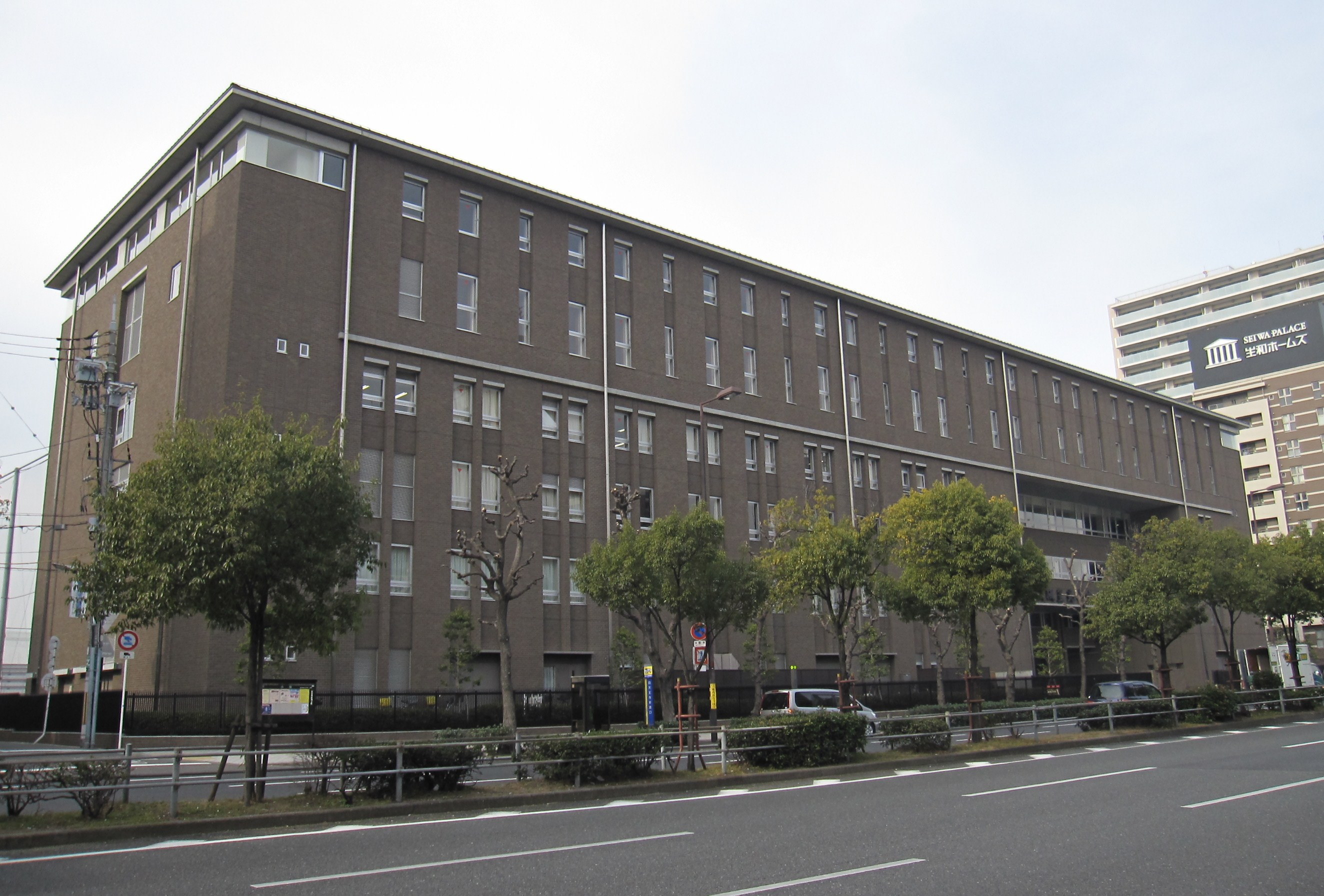 大阪星光学院中学校・高等学校 Canon IXY Digital 920 IS